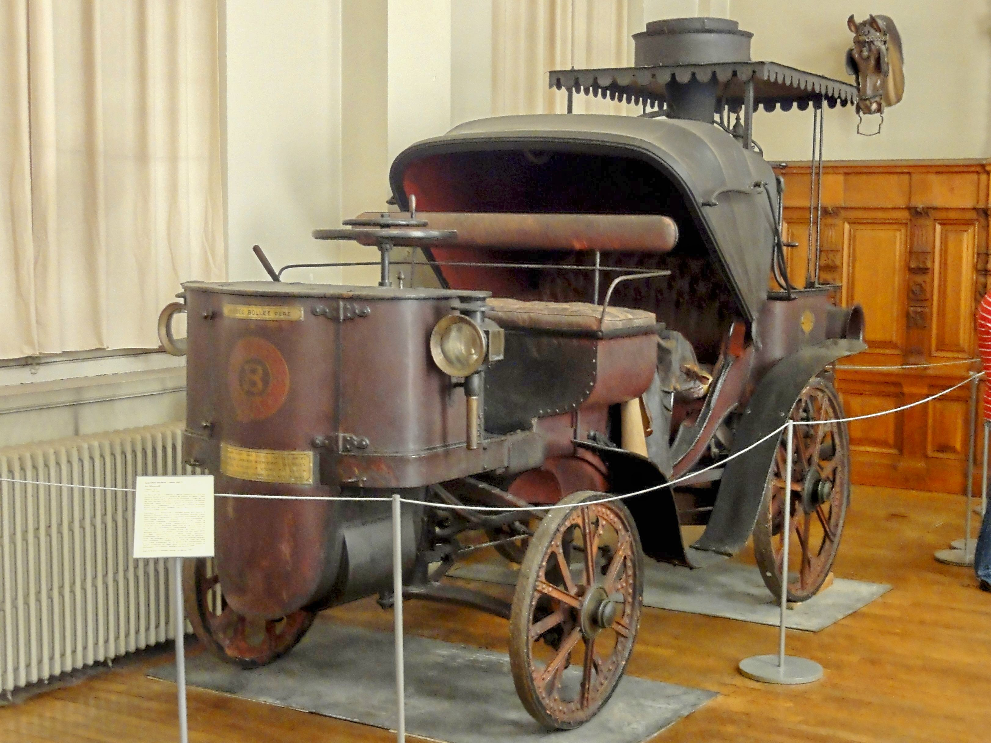 « La Mancelle » (voiture à vapeur), Amédée Bollée, Le Mans, 1878.